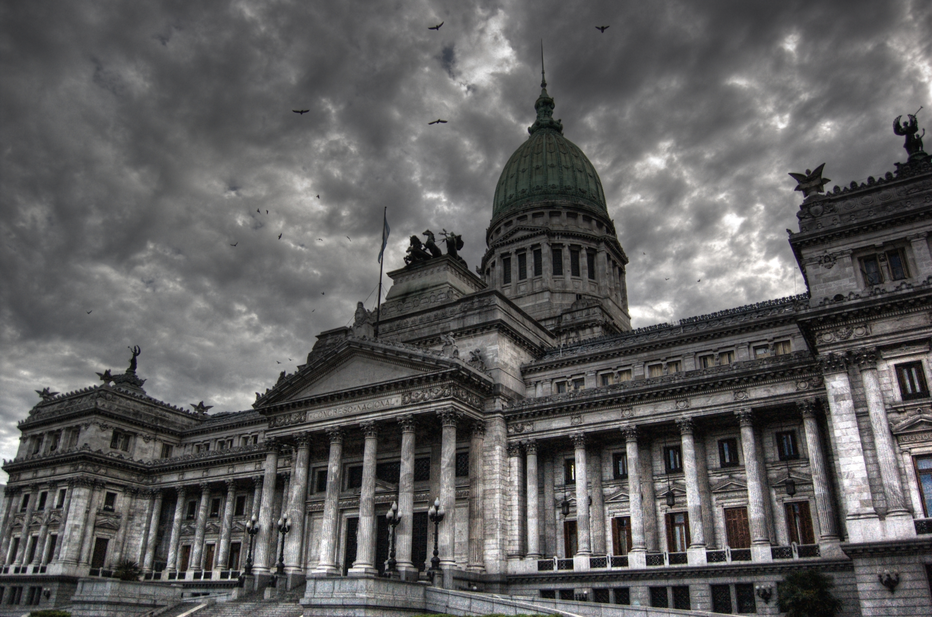 Palacio del Congreso de la Nación Argentina, Buenos Aires, Argentina